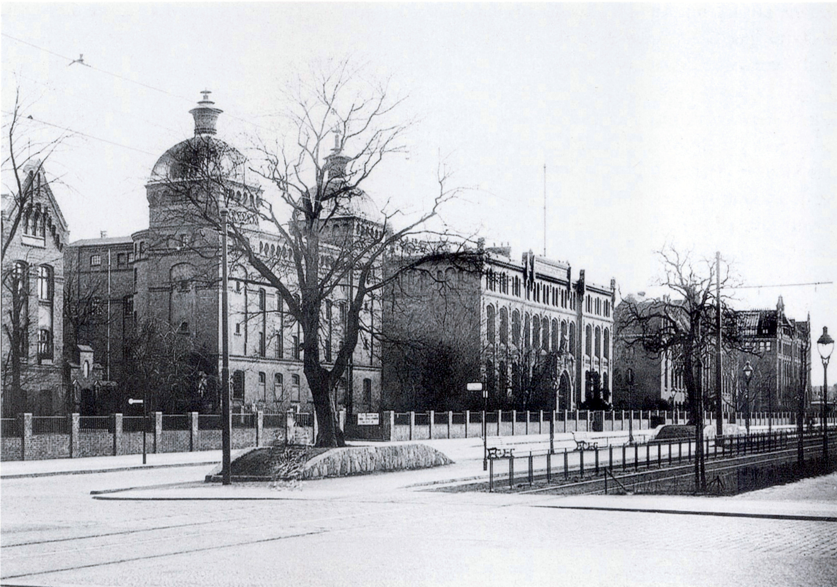 Berlin-Wedding, Seestraße 13: Alte Mälzerei mit dem Prinzessinturm 1910; rechts davon: Institut für Gärungsgewerbe